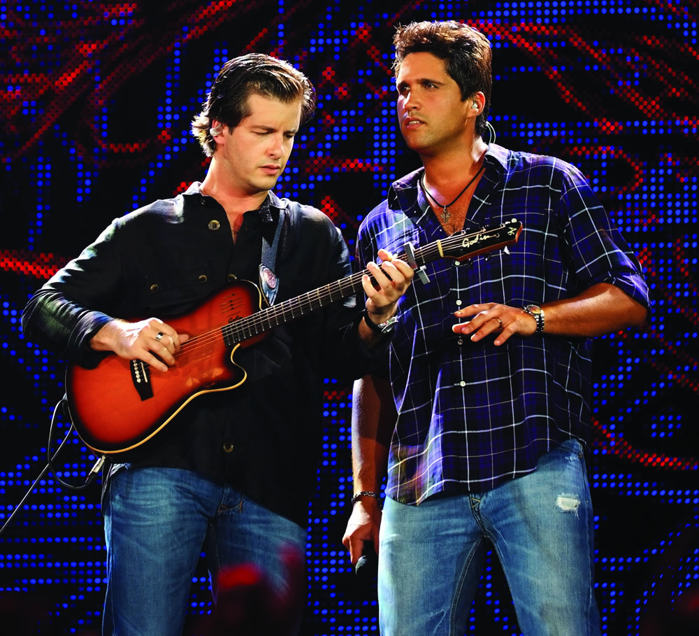 Gravação DVD Victor & Leo Ao vivo e em Cores